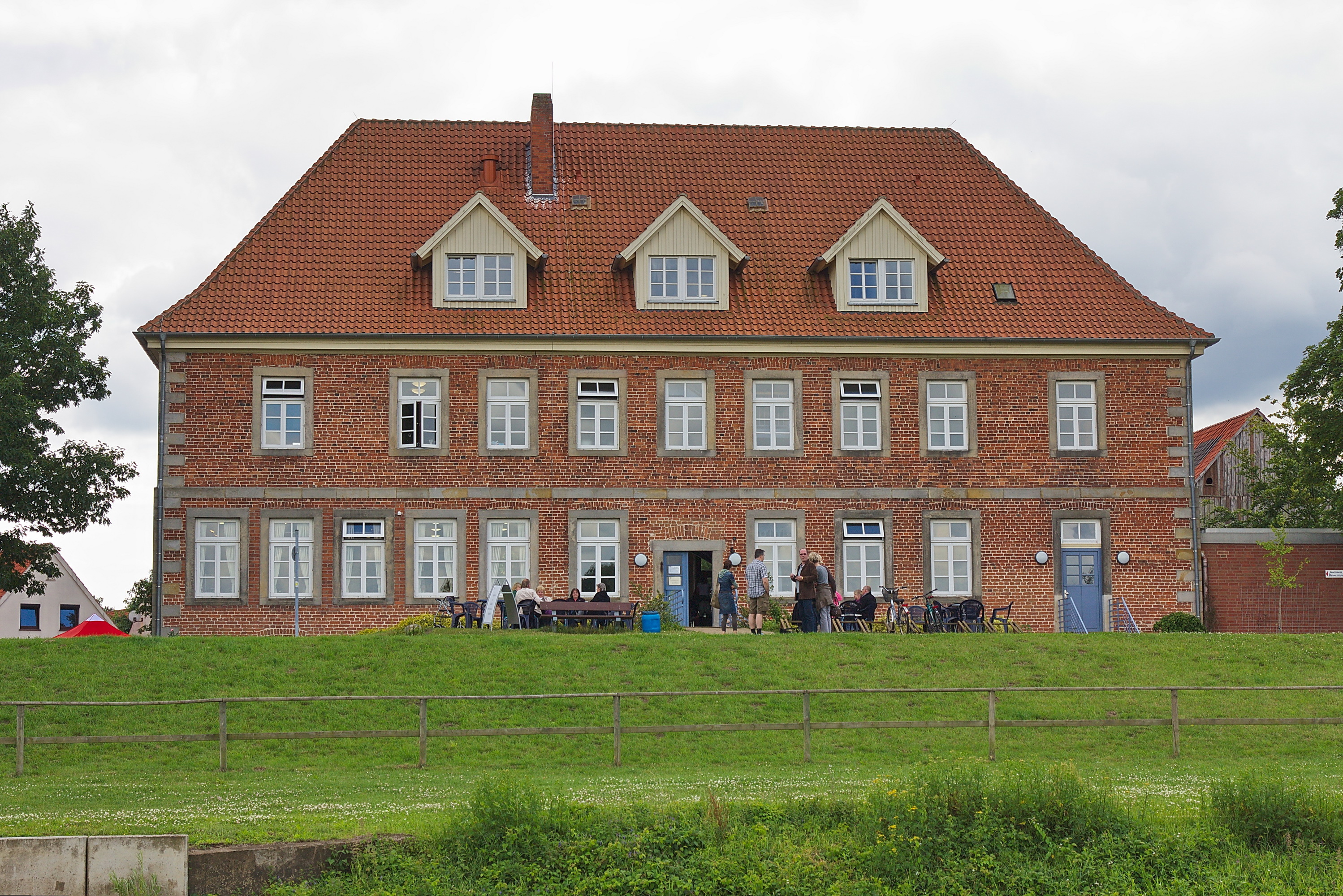 Amtshaus in Westen (Dörverden), Niedersachsen, Deutschland.